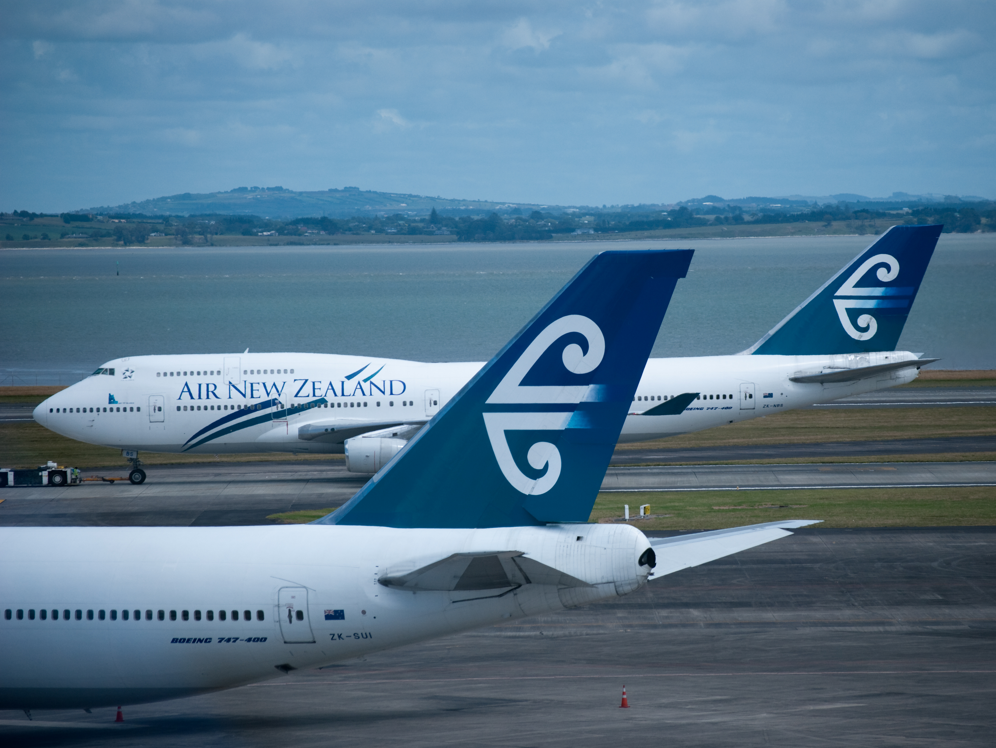 ANZ